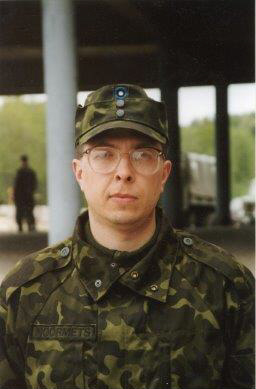 Tiit Noormets, 1997